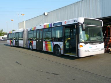 Scania Omnicity articulés livré Arc-En-Ciel de la ville d'angers.